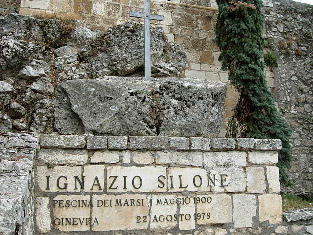 Tomba di Ignazio Silone Foto personale concessa in PD